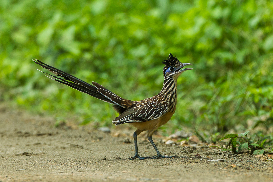 Lesser Roadrunner - Mexico_S4E1497